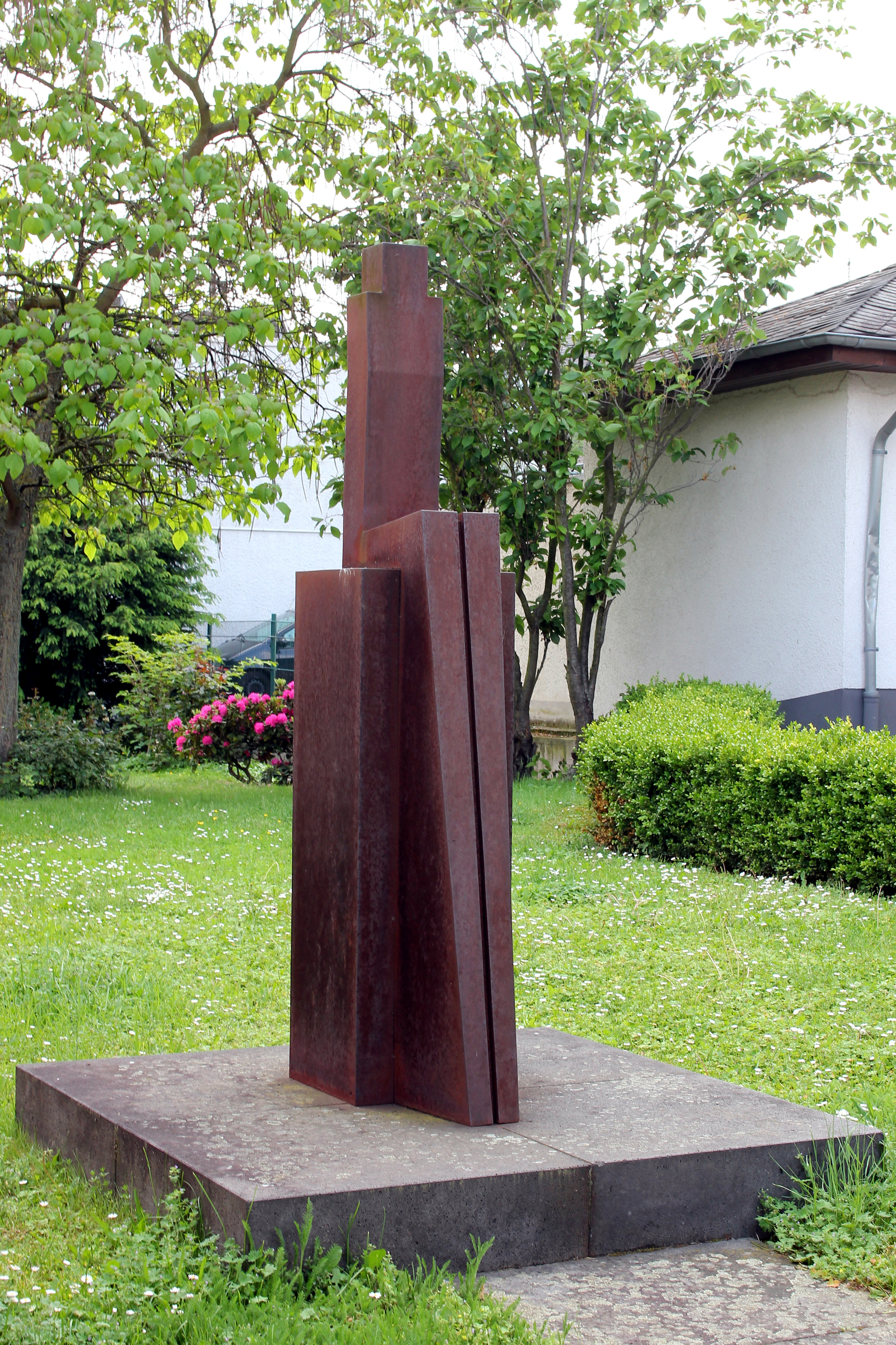 Mülheim-Kärlich,„Sitzende“, Skulptur am Kapellenplatz von Martine Andernach, 1996